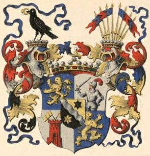 Bellingshauseni suguvõsa vabahärravapp